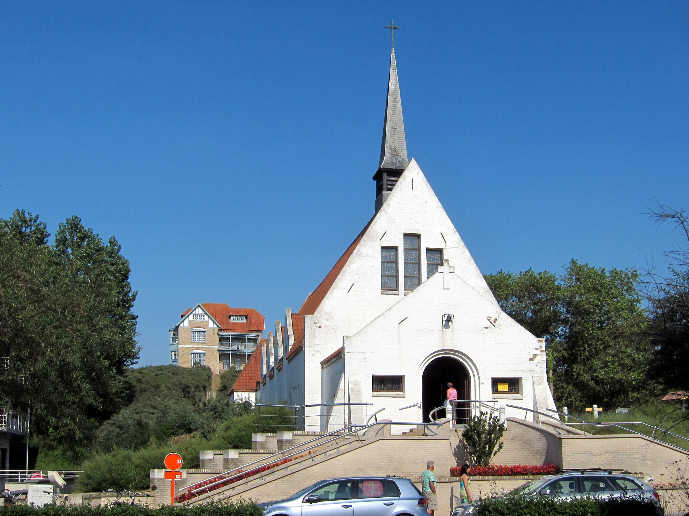 La chapelle Notre-Dame des Dunes (Zomerkapel) construite en 1927 à Oostduinkerke.